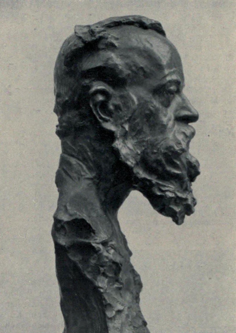 buste de Wilhelm Wundt